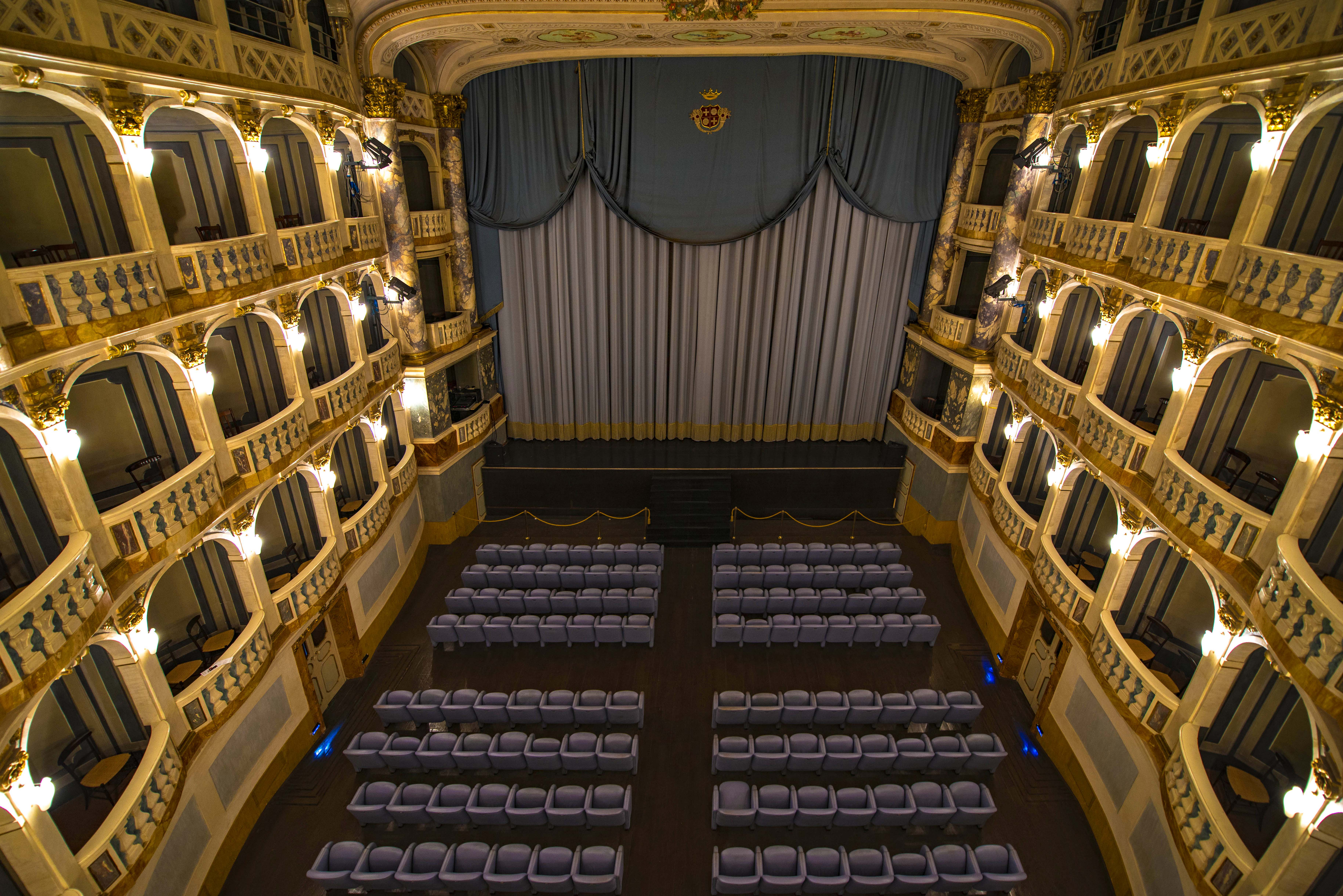 Teatro Lauro Rossi This is a photo of a monument which is part of cultural heritage of Italy.